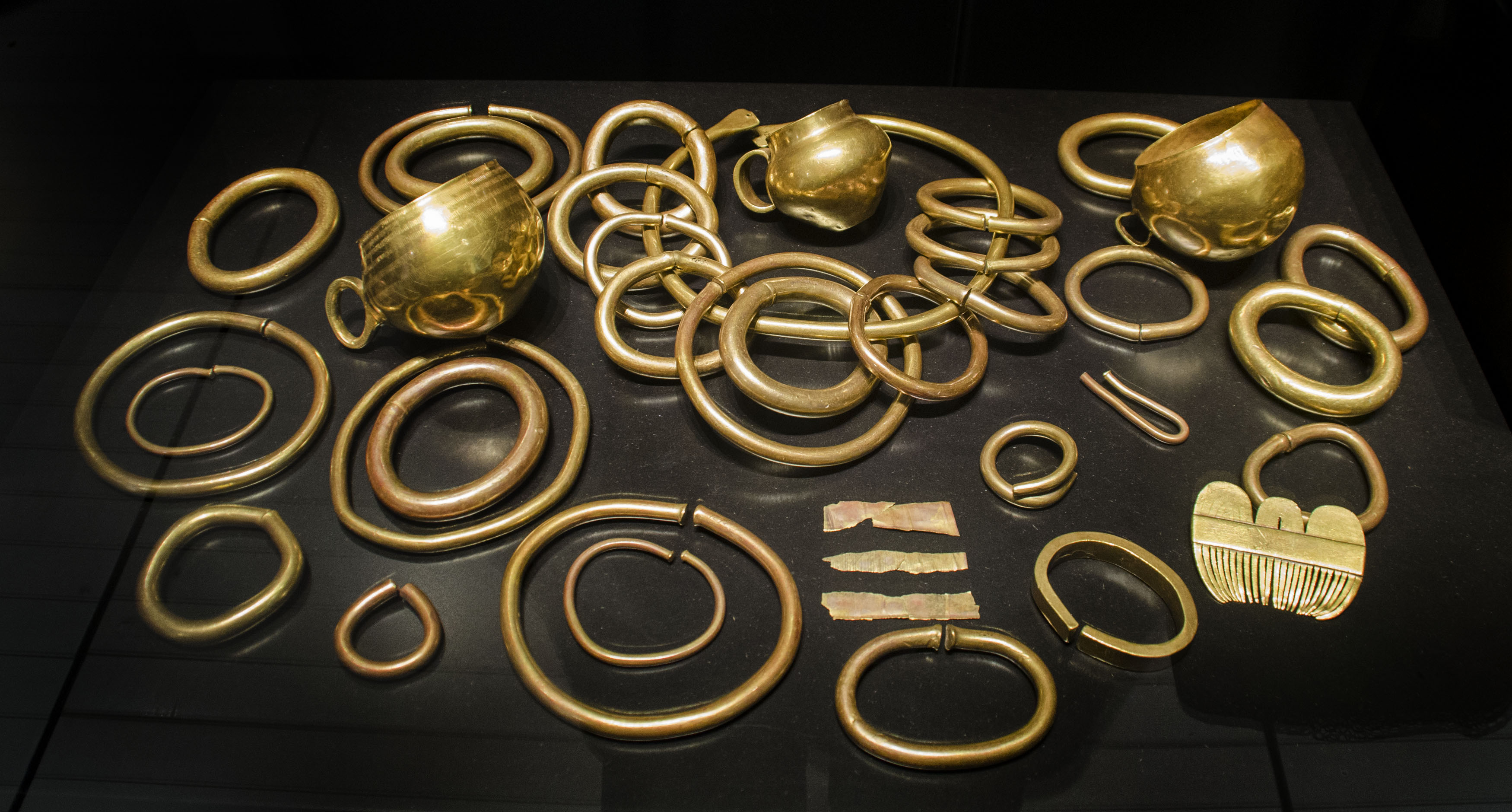 Este conjunto de piezas de oro se encontró fortuitamente en diciembre de 1940 en As Silgadas (Caldas de Reis, Pontevedra). El "tesoro" original constaba de más piezas pero algunas han desaparecido. Está datado hacia 1600 a.C. Ver